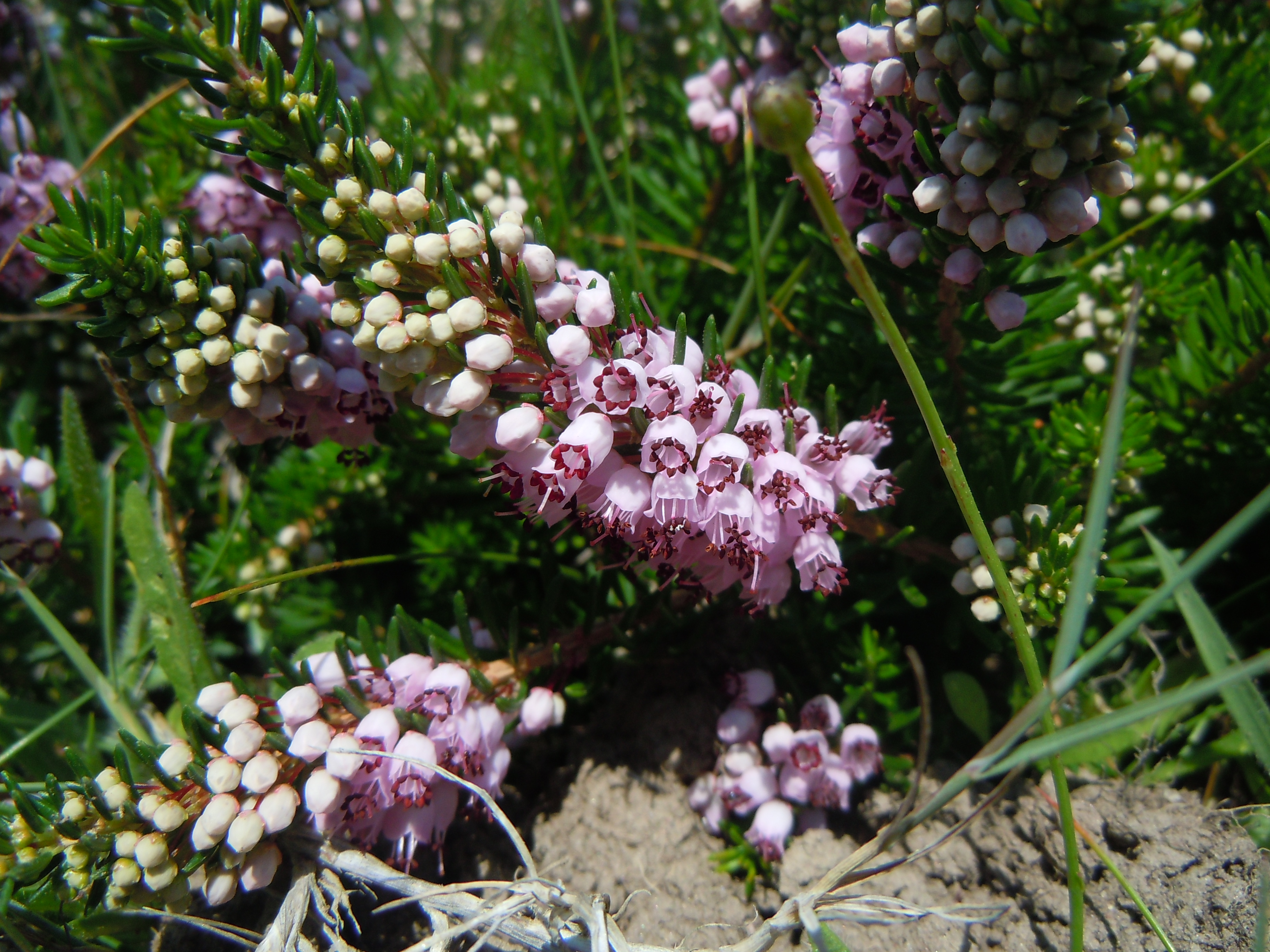 Bruyère vagabonde - Erica vagans - Belle-Île-en-Mer